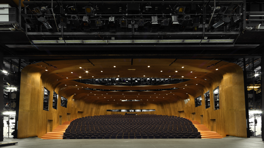 Schauspielhaus Düsseldorf, großer Saal nach der Sanierung